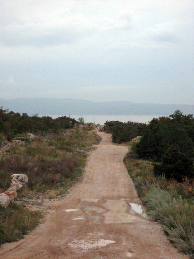 Trasa Jadranskog naftovoda, Croatia